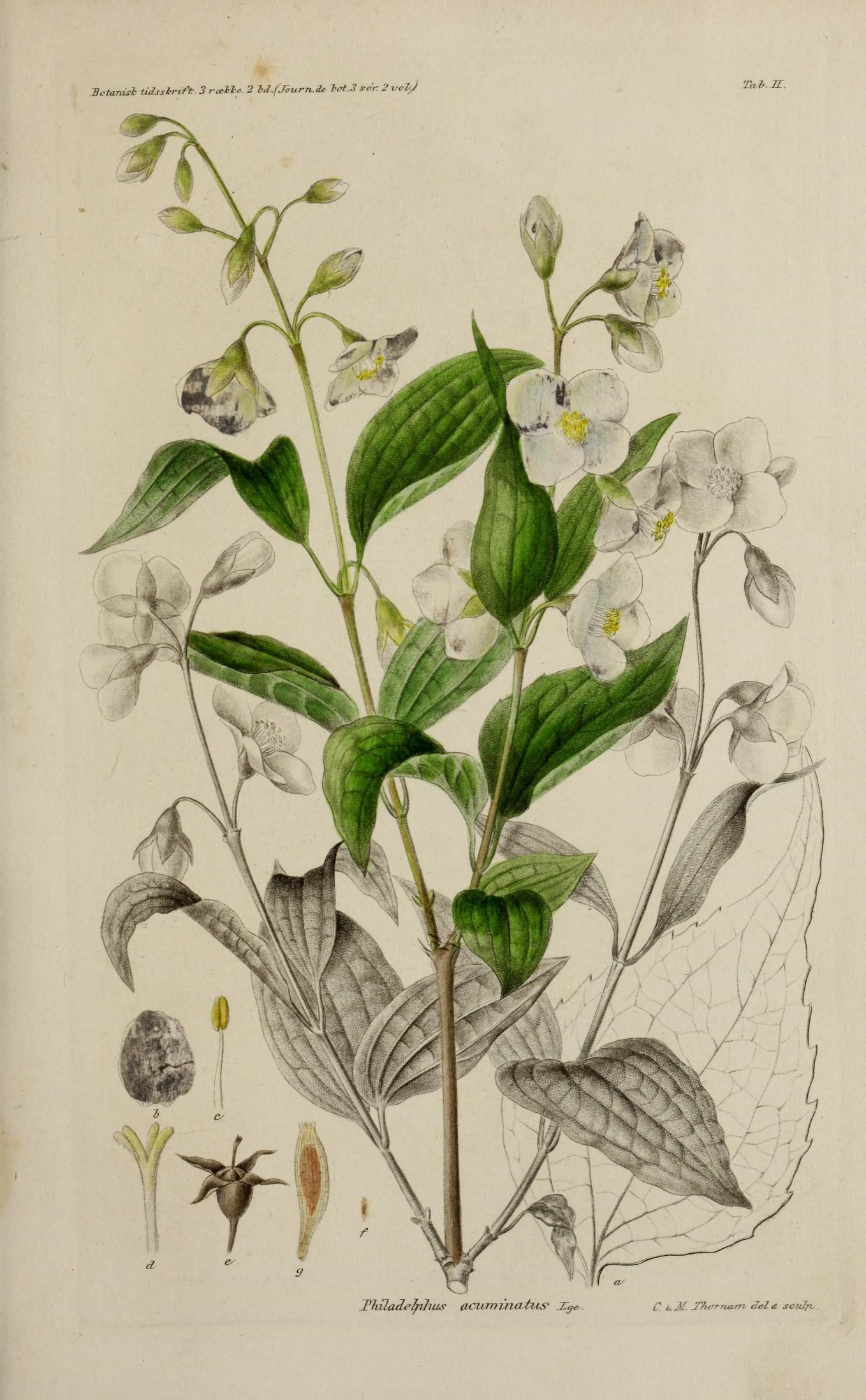 Botanisk Tidsskrift / udgivet af Dansk Botanisk Forening.